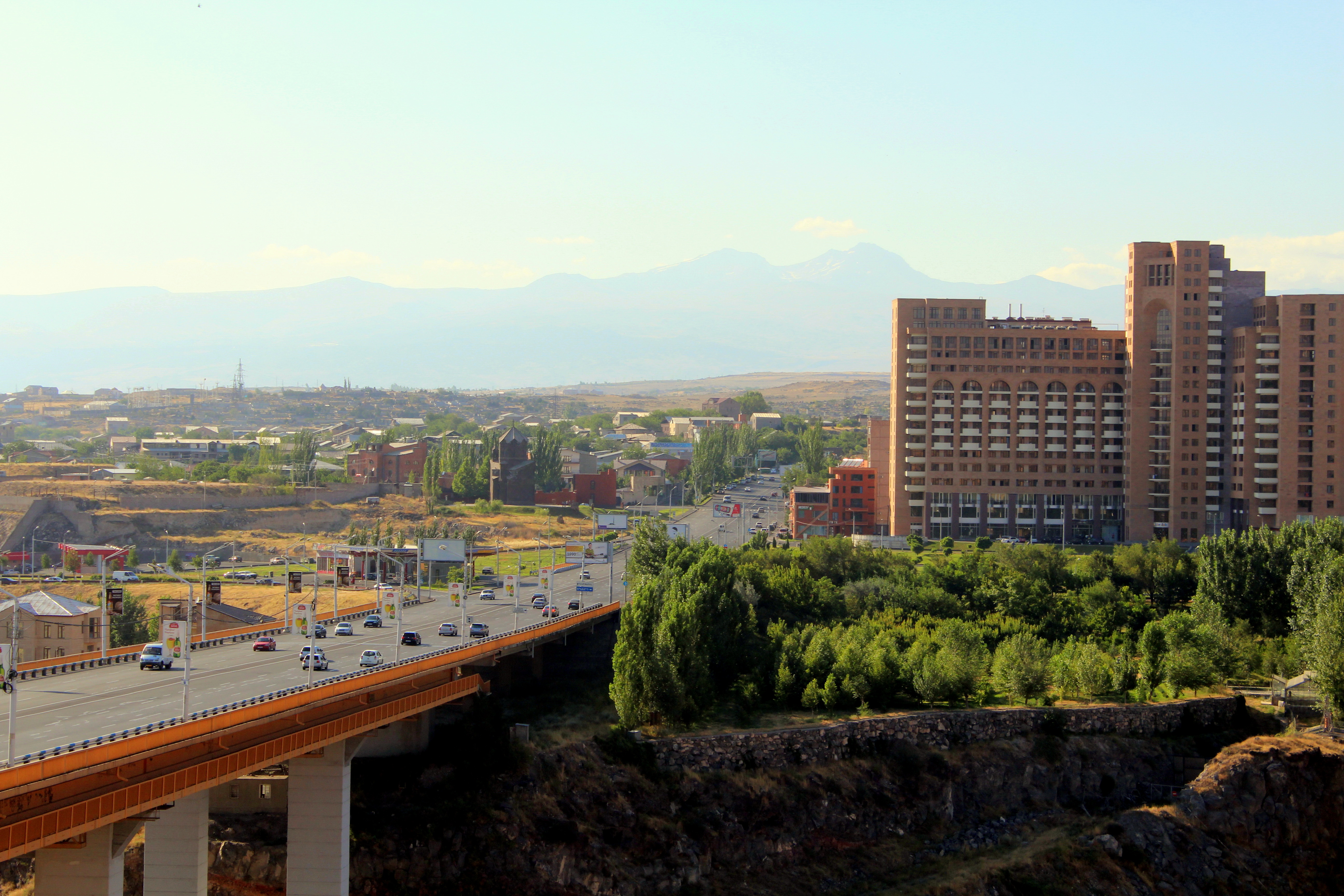 Դավթաշեն1